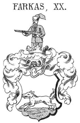 A boldogfai Farkas család cimere - Siebmacher könyvben szereplő rajz